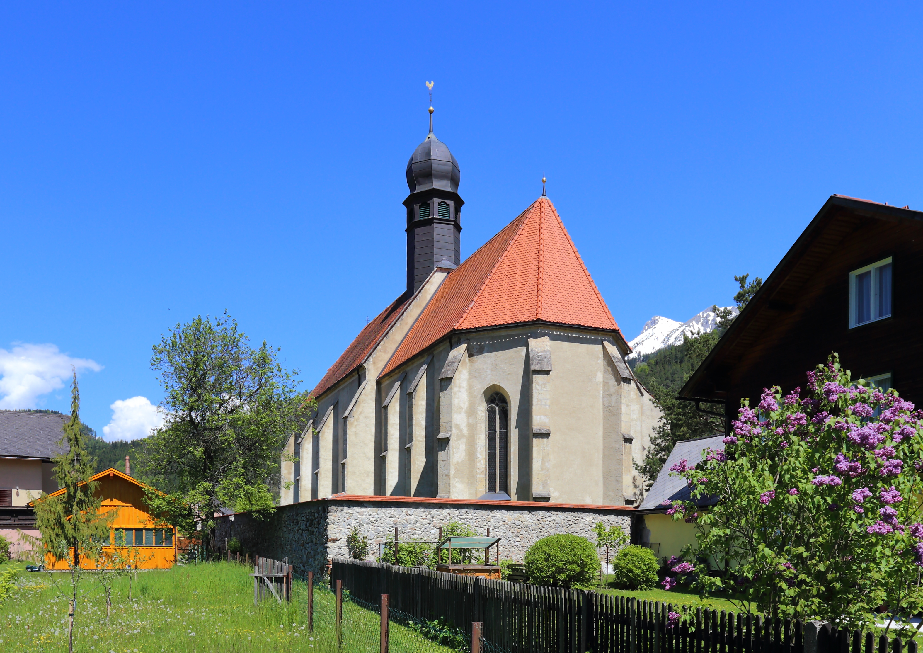 Südansicht der röm.-kath. Filialkirche Mariä Himmelfahrt am grünen Anger in der steiermärkischen Marktgemeinde Neuberg an der Mürz. Ein einheitlicher spätgotischer Bau aus dem 16. Jahrhundert mit einem dreijochigen Langhaus, einem eingeschnürten zweijochigen Chor und einem achtseitigen Dachreiter mit Zwiebelhelm.